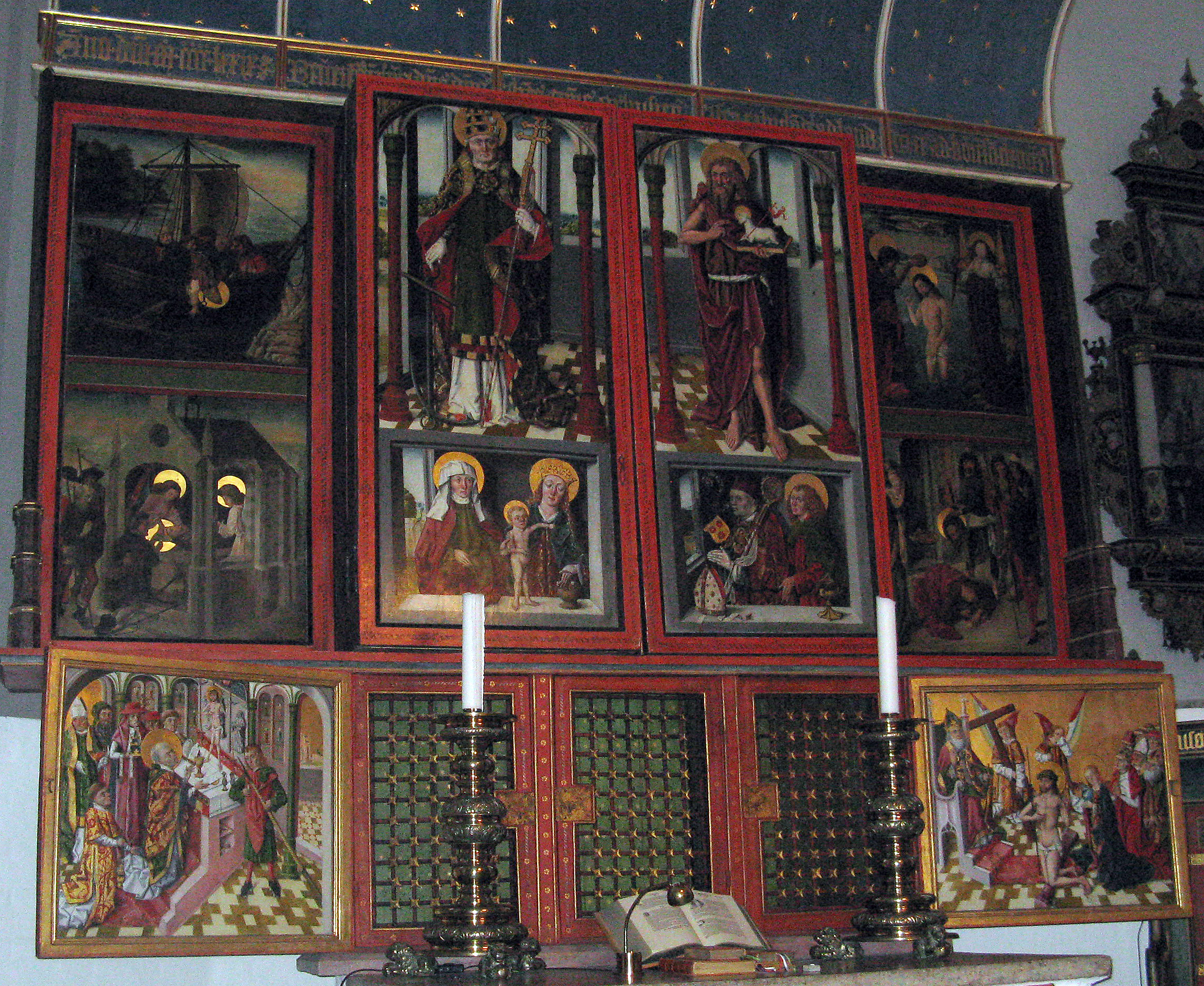 Hovedfelterne og fløjene Adventssiden af Bernt Notkes altertavle i Århus Domkirke